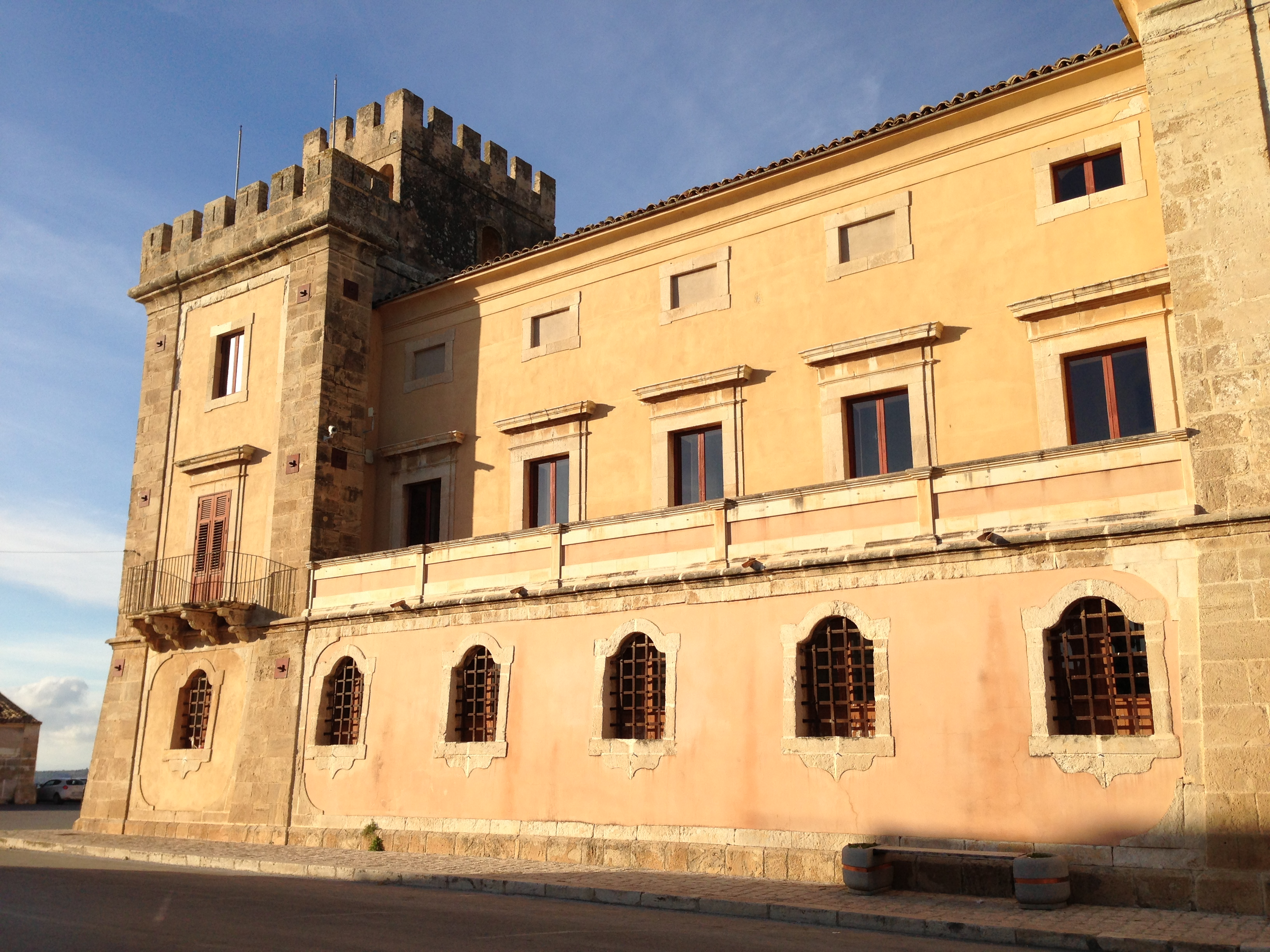 Facciata sinistra del Castello dei Principi di Biscari ad Acate (RG), Sicilia, Italia.